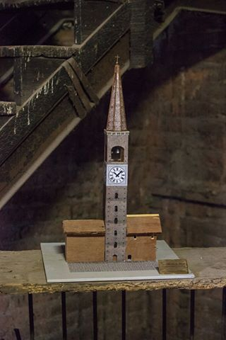 Torre Comunale originaria, con tetto a punta e orologio.